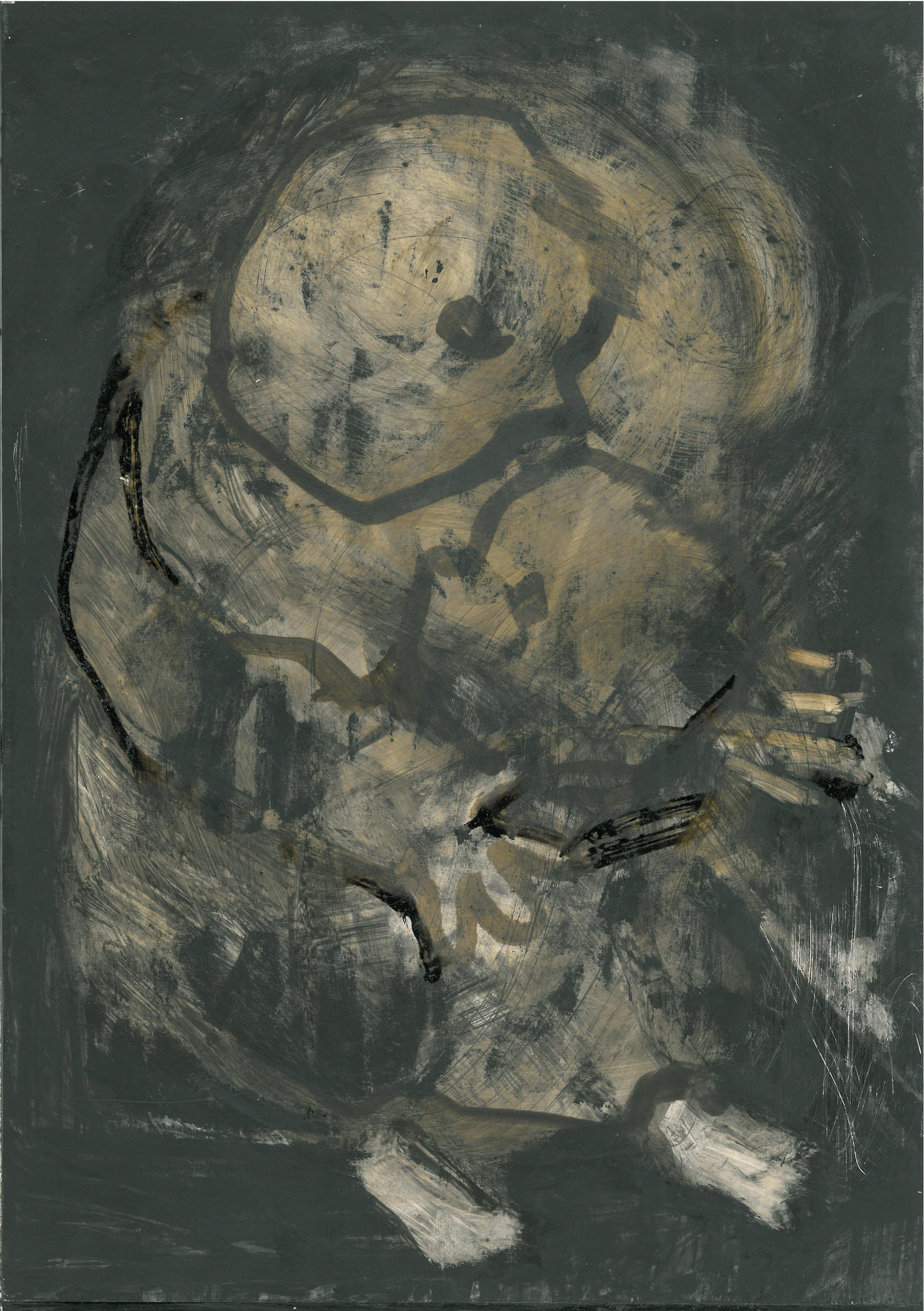 טכניקה מעורבת על נייר , 42/30 ס"מ, 2009